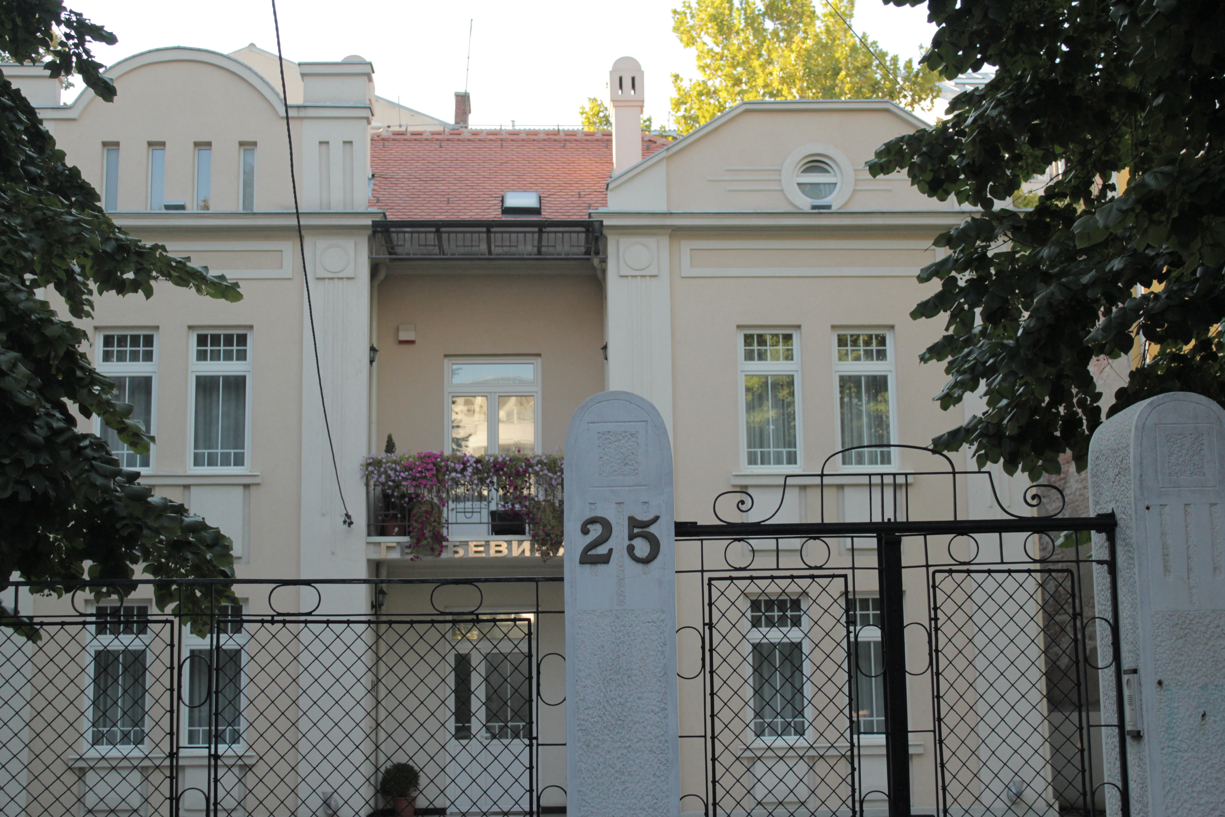 Кућа војводе Петра Бојовића